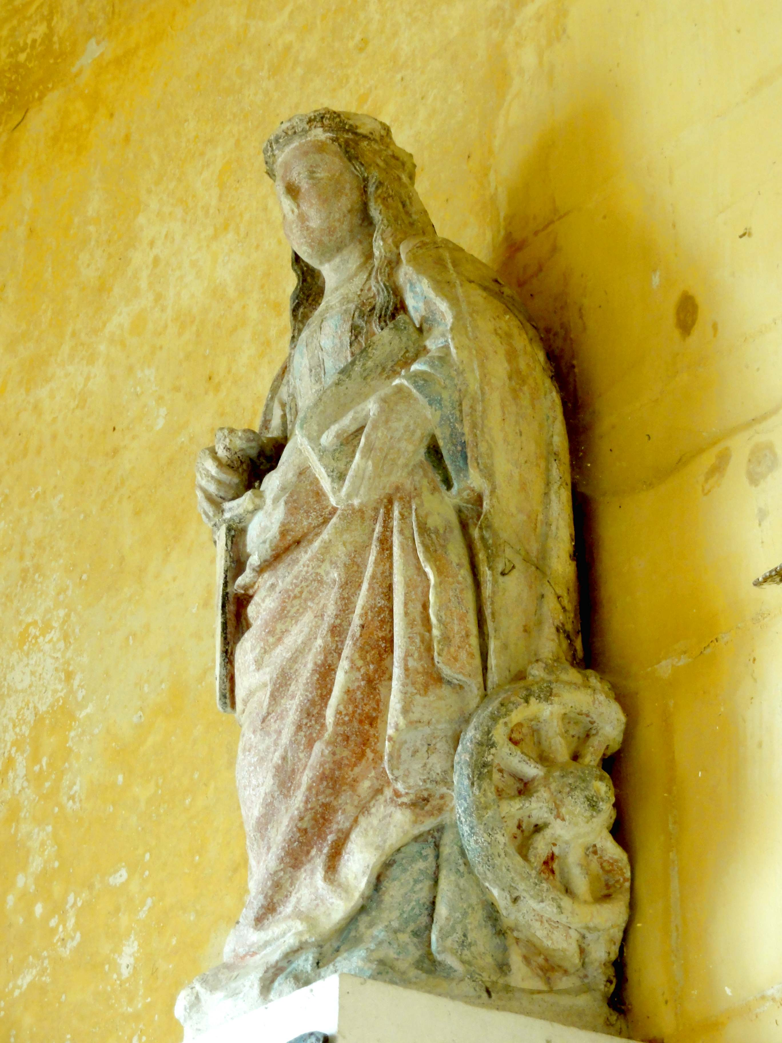 Mobilier de l'église - voir titre.